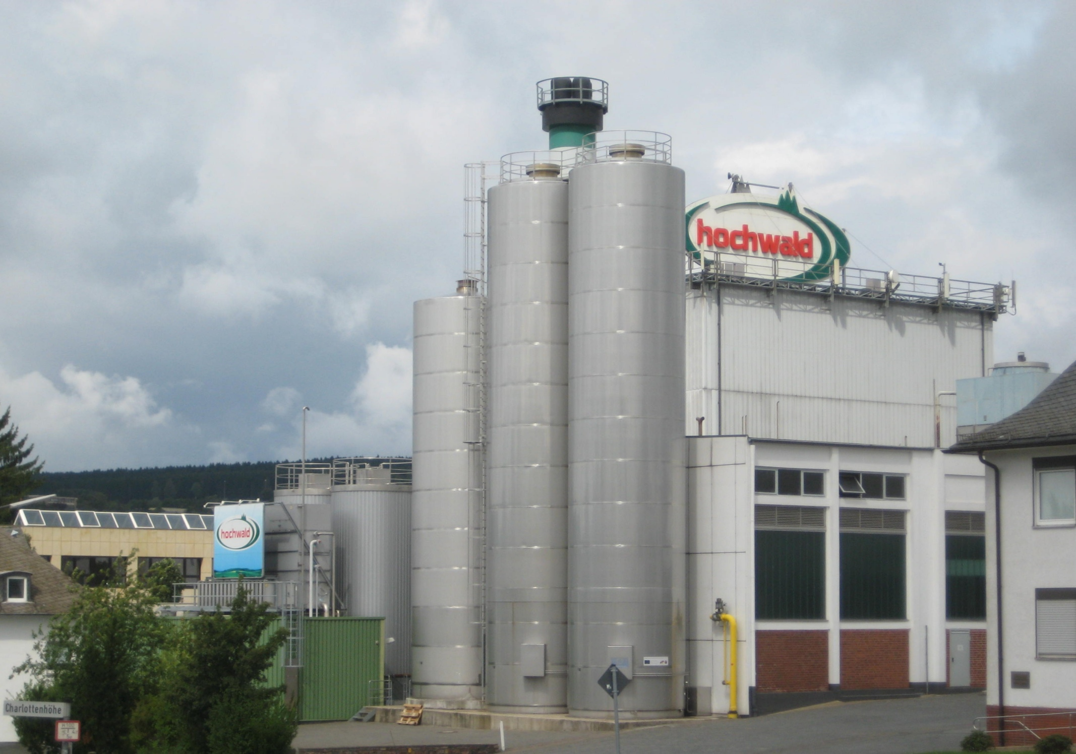 Das Thalfanger Werk der Hochwald Nahrungsmittel-Werke GmbH.